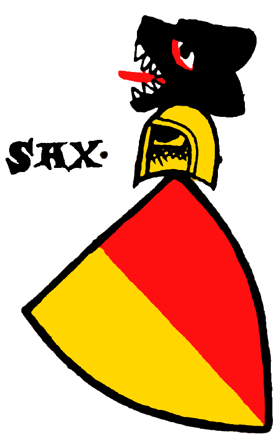 Wappen der Sax